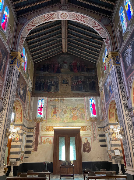 Santuario di Nostra Signora del Ponte, Lavagna, Liguria, Italia